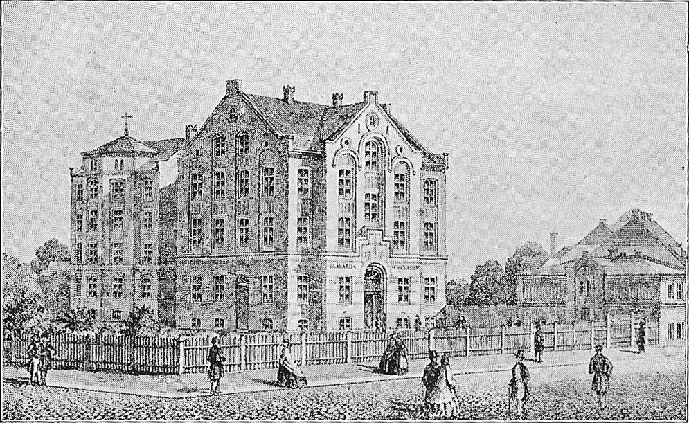 Blaagaards Seminarium.